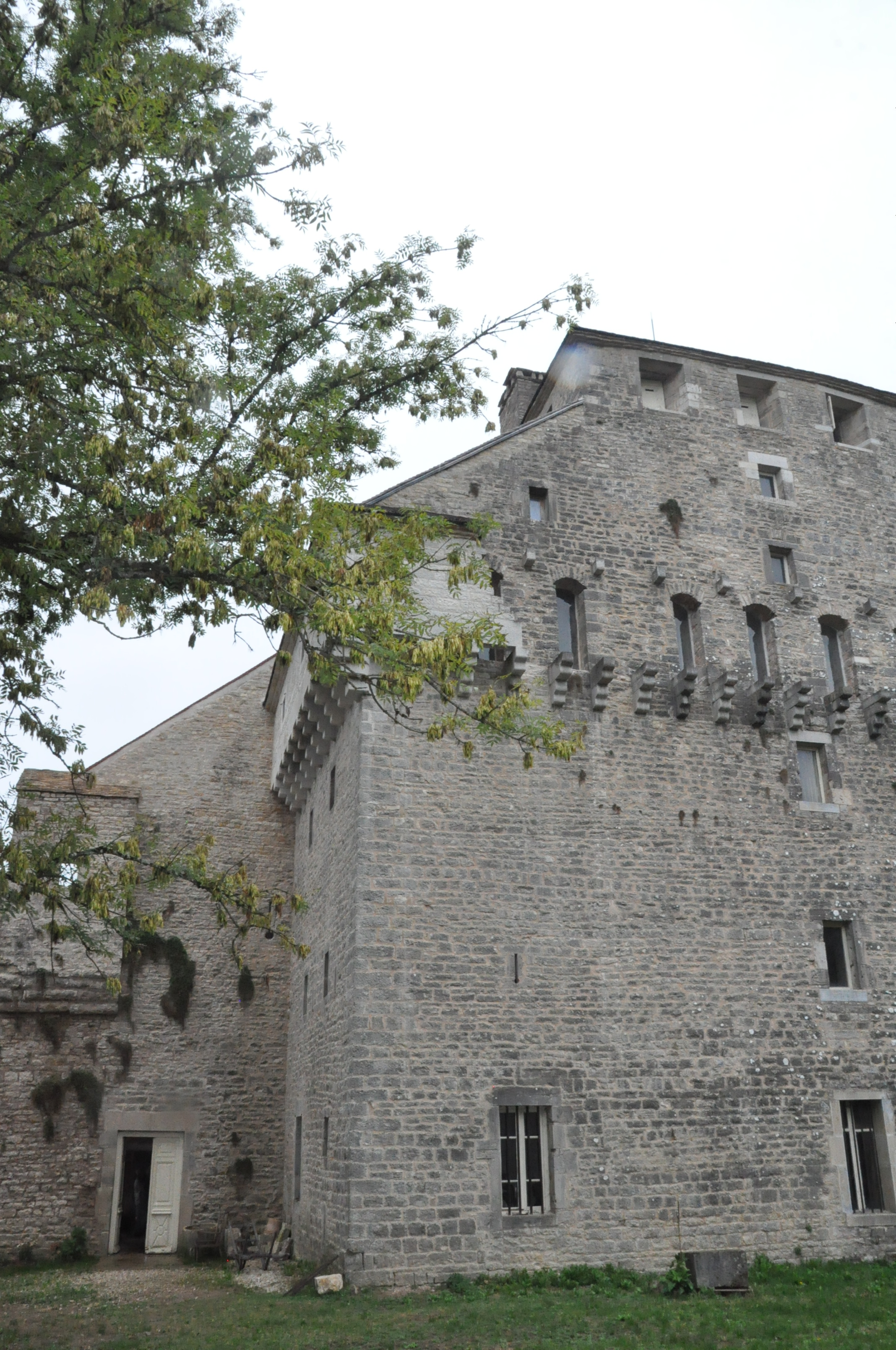 Château de Vallerois-le-Bois (Classé) .